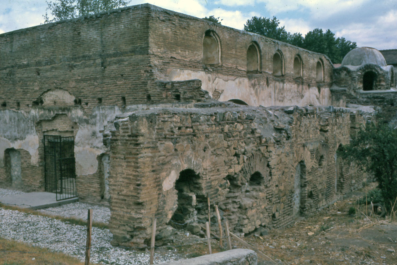 Turchia. Bursa (provincia di). Nicea (oggi Iznik). Concili ecumenici. Servizio fotografico : Iznik, 1962 / Paolo Monti. - Foglio: 1, Fotogrammi complessivi: 5/20 : Diapositiva, sviluppo cromogeno/ pellicola ; 35 mm. - ((Sullo chassis delle diapositive iscrizione manoscritta: "Nicea" e numeri manoscritti a matita in ordine numerico progessivo (1-5). - Sullo chassis delle diapositive impressi numeri. - Le diapositive nn. 06-17 costituiscono altre serie. . - Diapositive mancanti: le tasche n. 18, 19 e 20 del foglio in pvc che contiene le diapositive sono vuote. - Fonte: Rubrica di Paolo Monti: Diapositive 24x36mm (1948-1982), presso Archivio Paolo Monti. Rubrica con elenco soggetti e numeri di inventario (da 1 a 1000) corrispondenti ai fogli a tasche in pvc in cui sono contenute le diapositive.